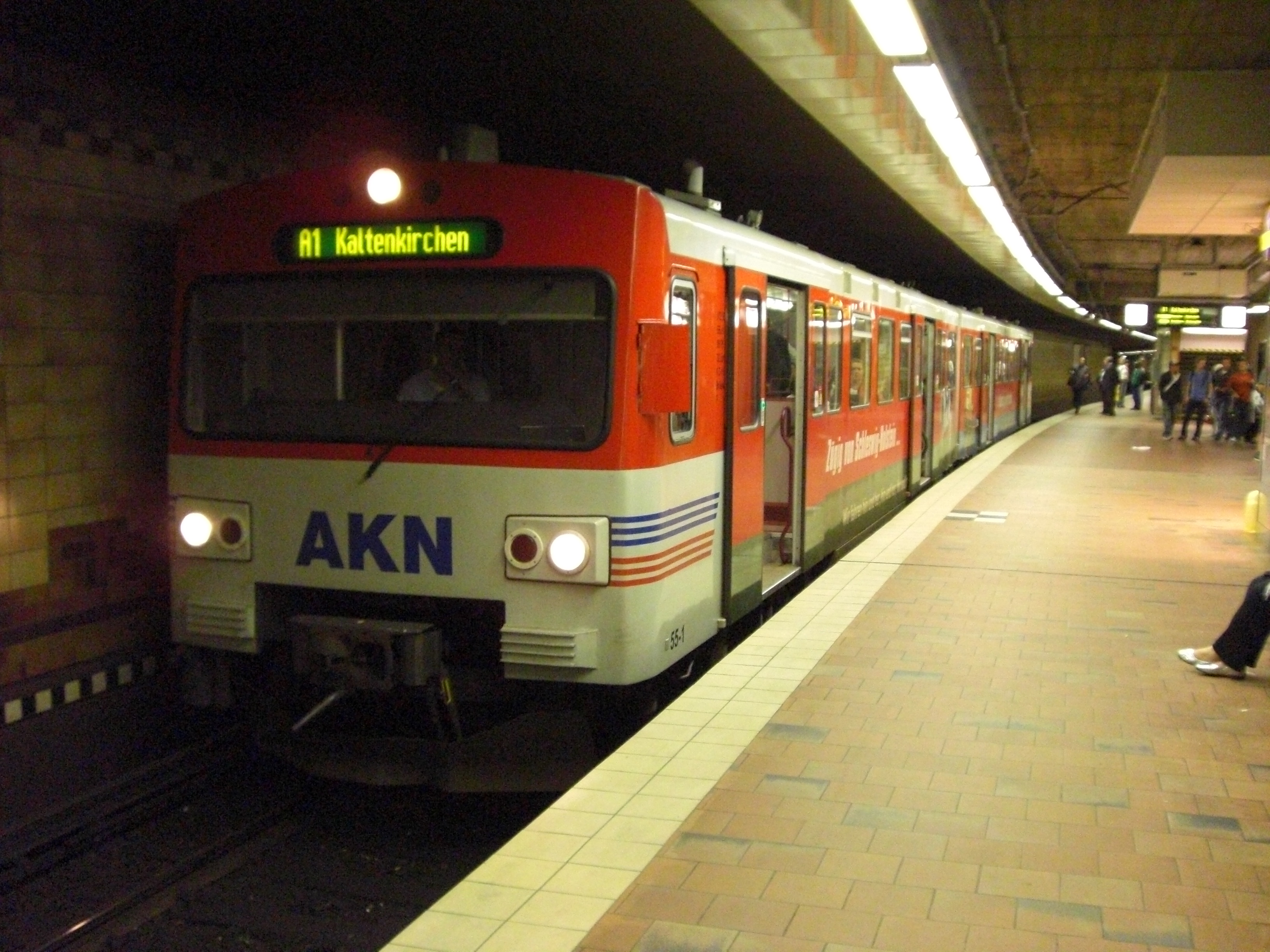 Triebzug der AKN am Tunnelbahnsteig der S-Bahn am Hamburger Hauptbahnhof